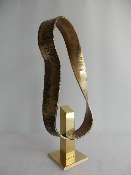 Elutööpreemiaga kaasneb skulptor Stanislav Netchvolodovi messingist lauaskulptuur „Möbiuse leht“